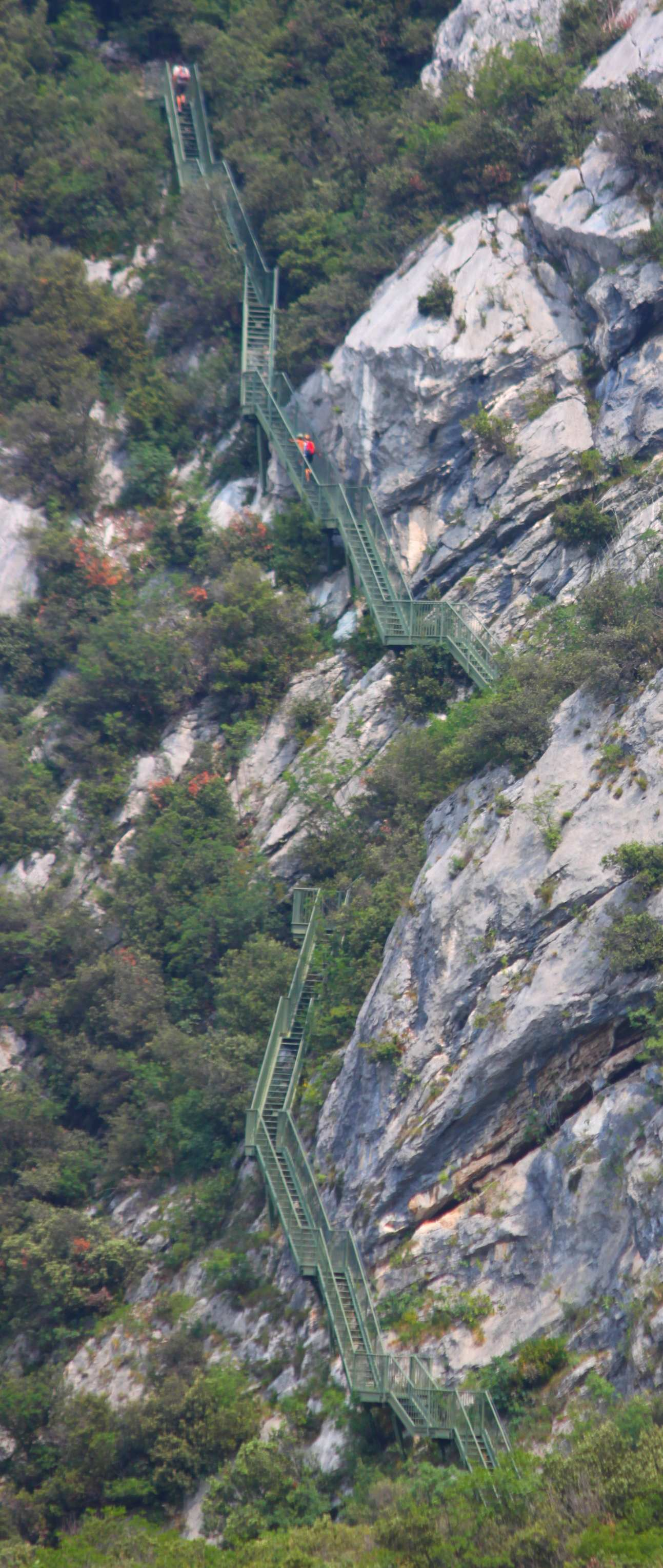 Der Sentiero Busatte Tempesta ist ein Wanderweg an den Berghängen zwischen Torbole und Tempesta mit Blick auf den Gardasee